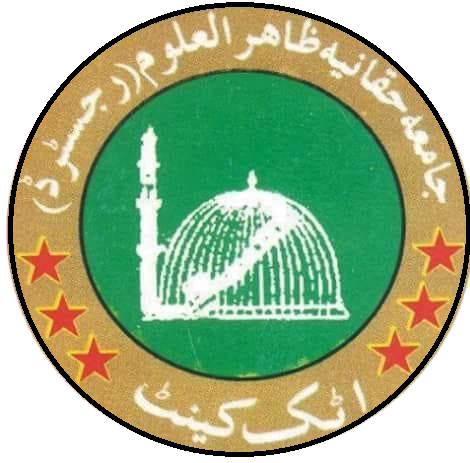 جامعہ حقانیہ ظاہرالعلوم رجسٹرڈ اٹک کینٹ